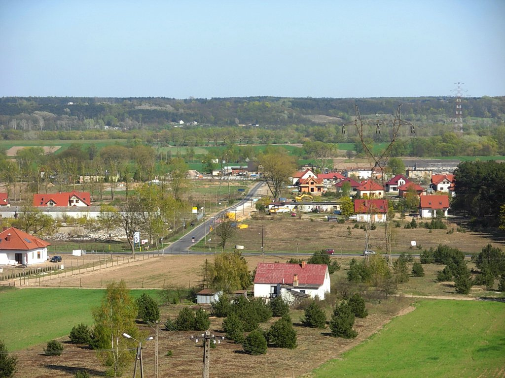 Osiedle Mariampol w Bydgoszczy-Fordonie na tle zboczy Fordońskiej Doliny Wisły